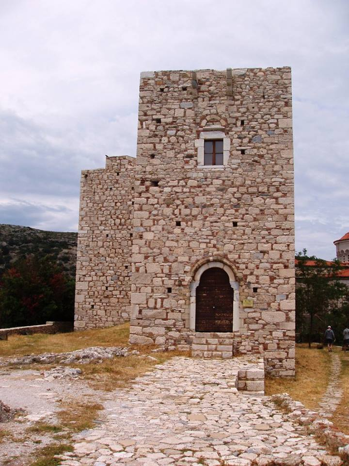 Ο πύργος κτίστηκε από τον Λυκούργο Λογοθέτη, αρχηγό της επαναστατημένης Σάμου. στη θέση ενός από τους πύργους του προϋπάρχοντος Βυζαντινού κάστρου του Πυθαγορείου . Το Βυζαντινό κάστρο είχε κτιστεί στη θέση του αρχαίου κάστρου της Σάμου στα τέλη του 7ου αιώνα, εποχή έξαρσης της πειρατείας στο Αιγαίο. Εγκαταλείφθηκε το 1475 μετά την κατάληψη του νησιού από τους Οθωμανούς. Ήταν το διοικητικό κέντρο των "Καρμανιόλων" κατά την Επανάσταση του 1821 και μέχρι την φυγή από τη Σάμο.